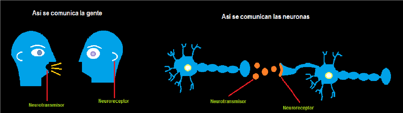 Los neurotransmisores es la forma de comunicarse de las neuronas